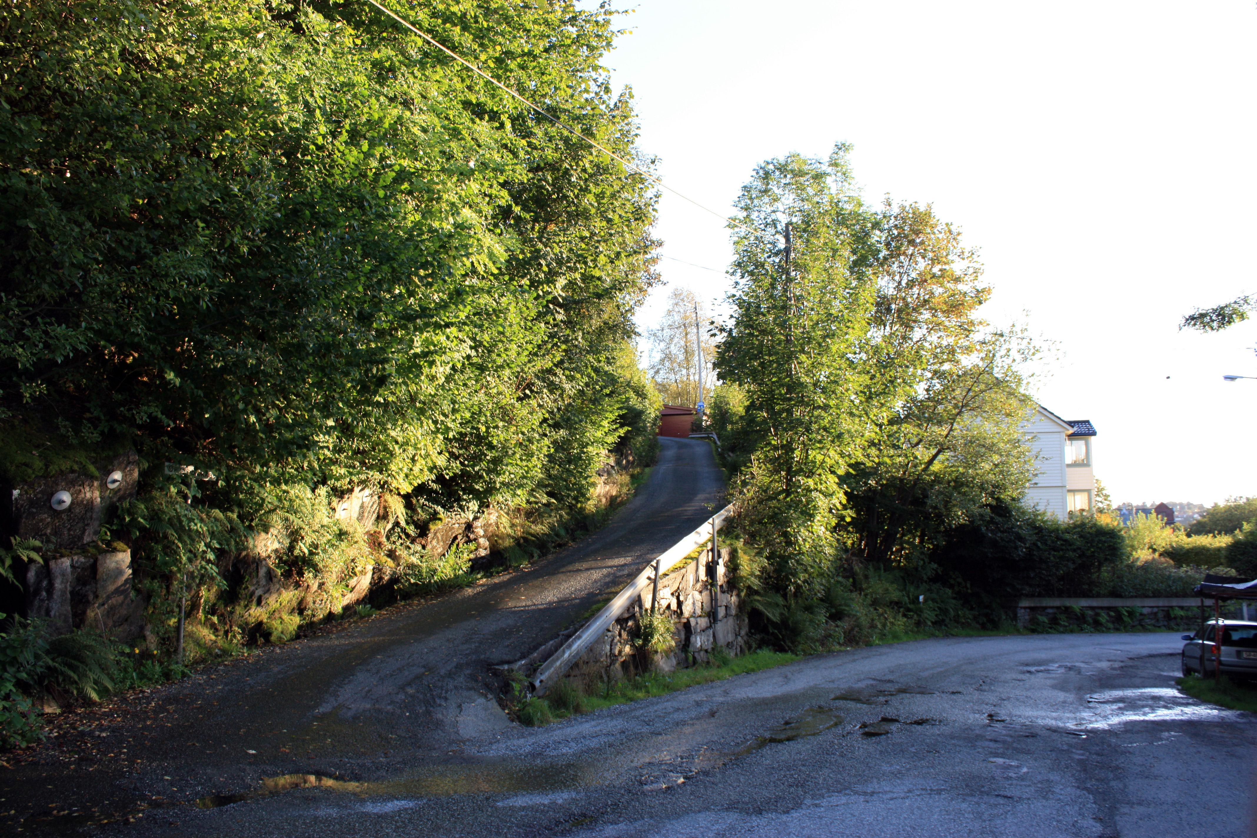 Øvsttunbrekka, Fana, Bergen.